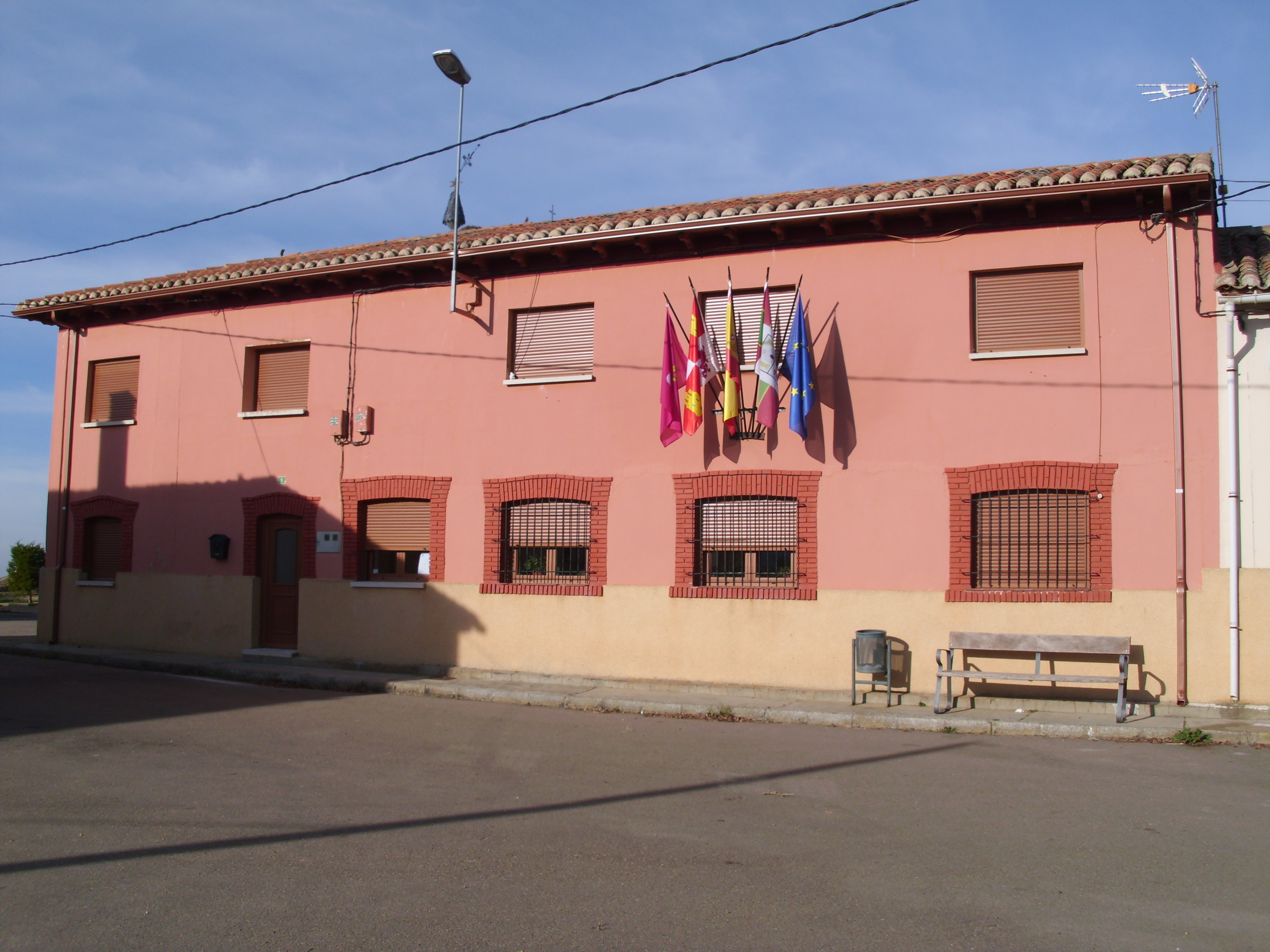 Ayuntamiento de Villamoratiel de las Matas